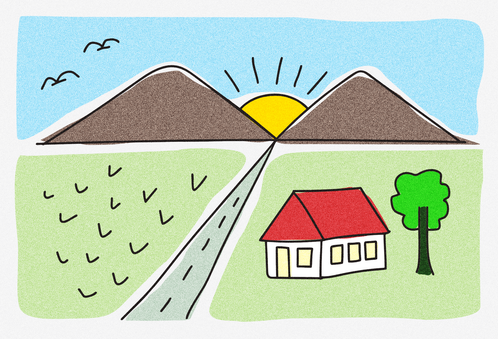 Pemandangan Dua Gunung lukisan generik anak-anak Indonesia